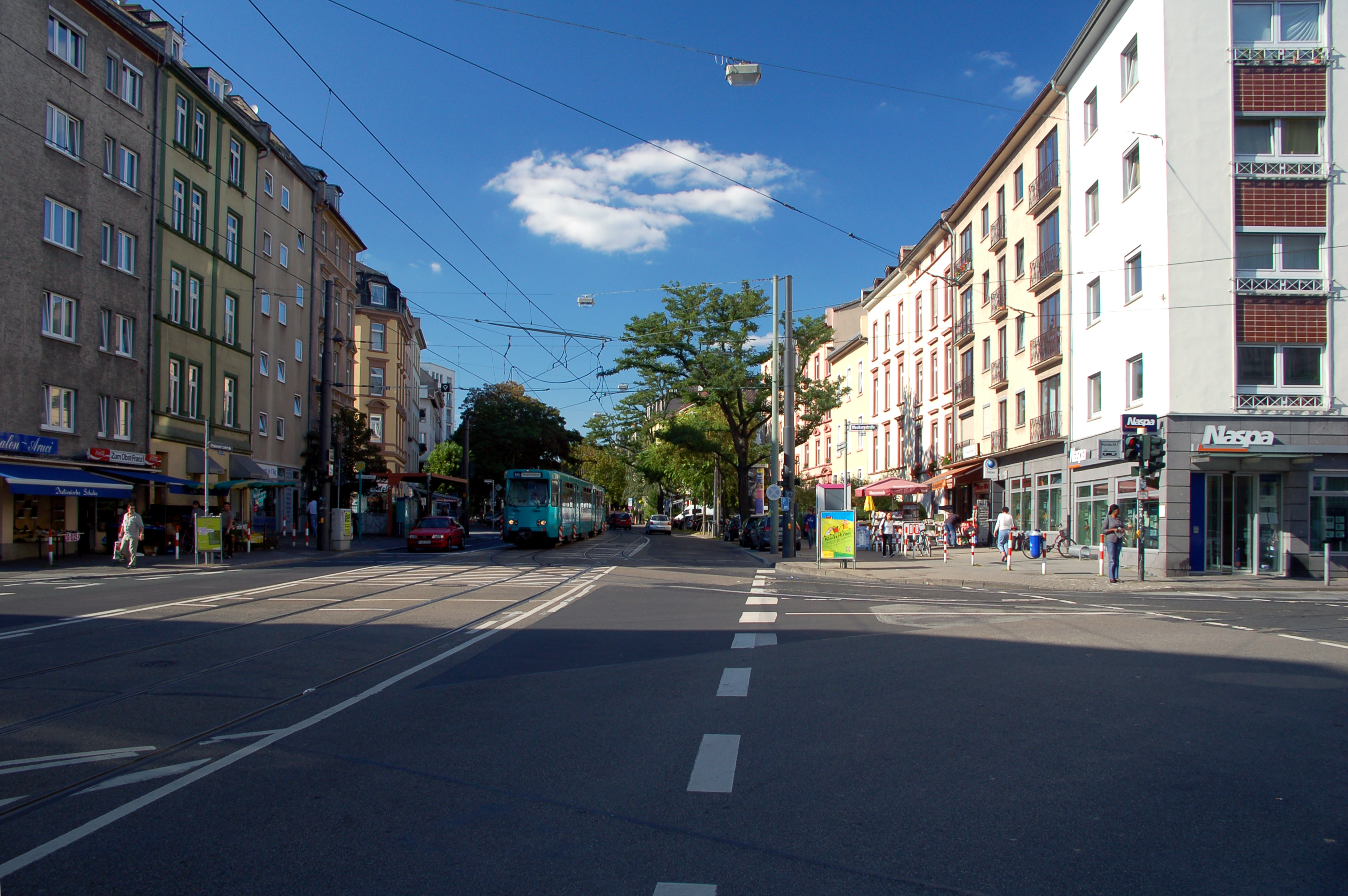 Eckenheimer Landstraße, Ecke Glauburgstraße